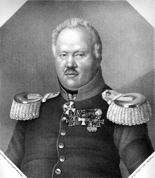 Вильгельм фон Брокгаузен